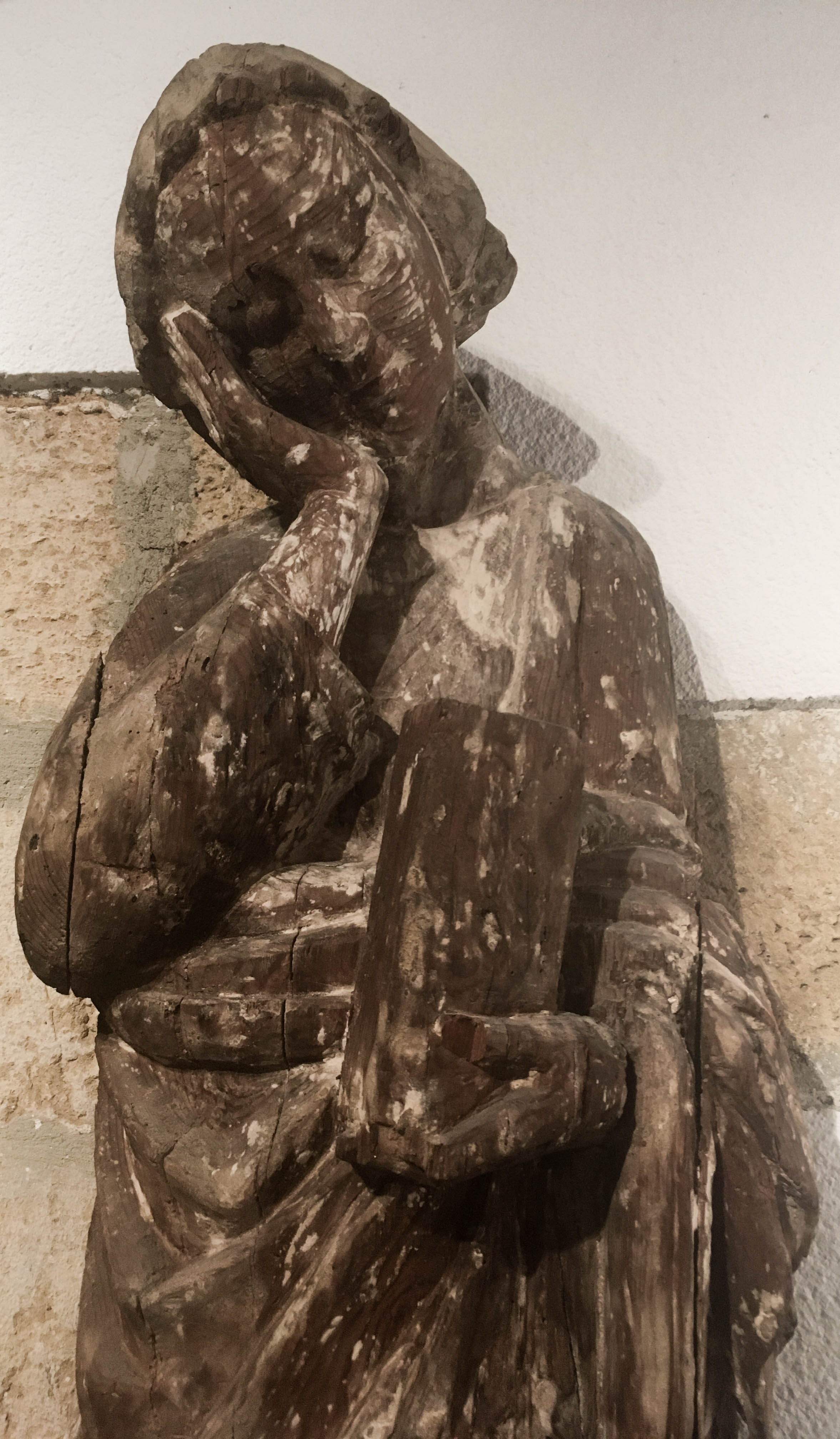 Encontrada en el osario de Villapeceñil y expuesta en el museo de la catedral de León